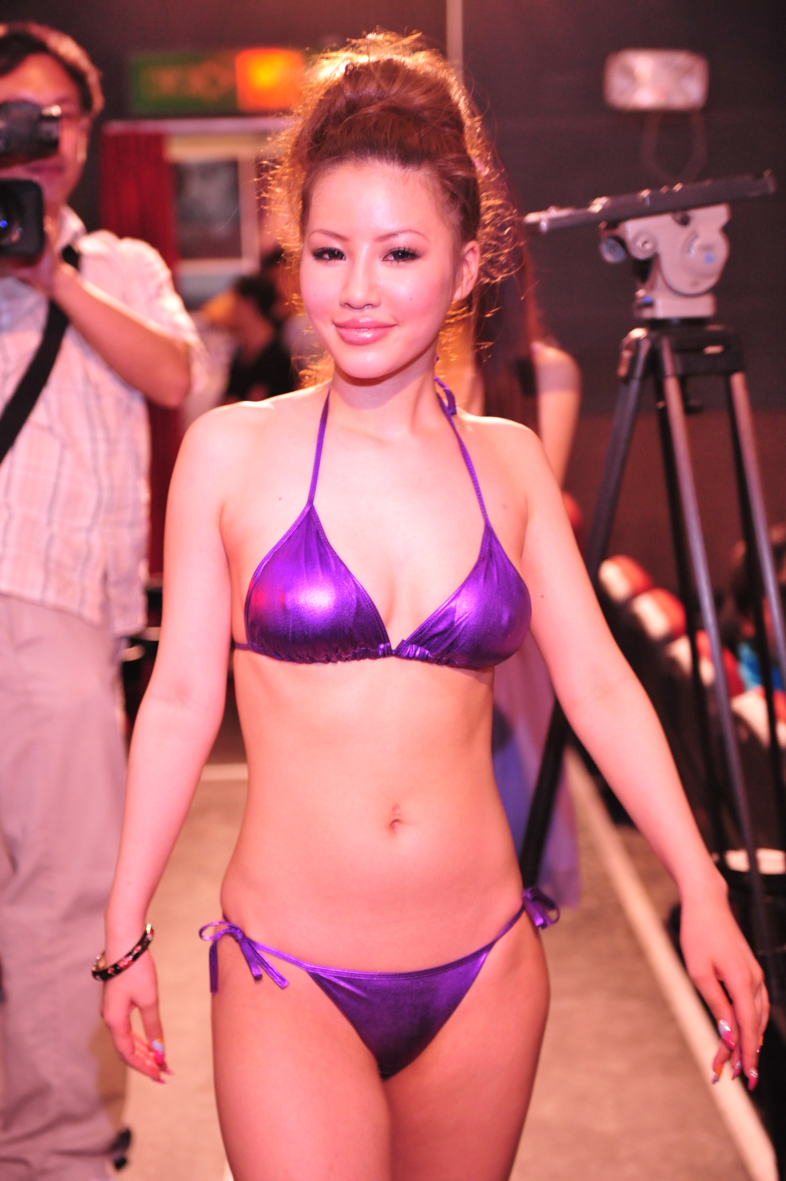 上原カエラ